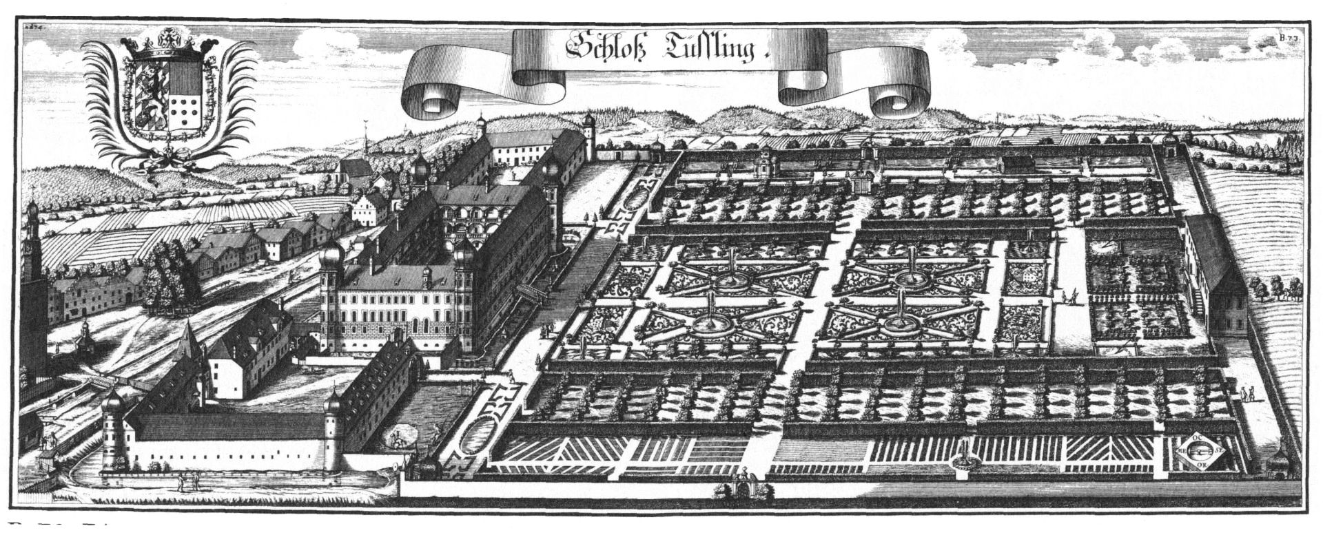 Schloss Tüssling nach einem Stich von Michael Wening (1721)